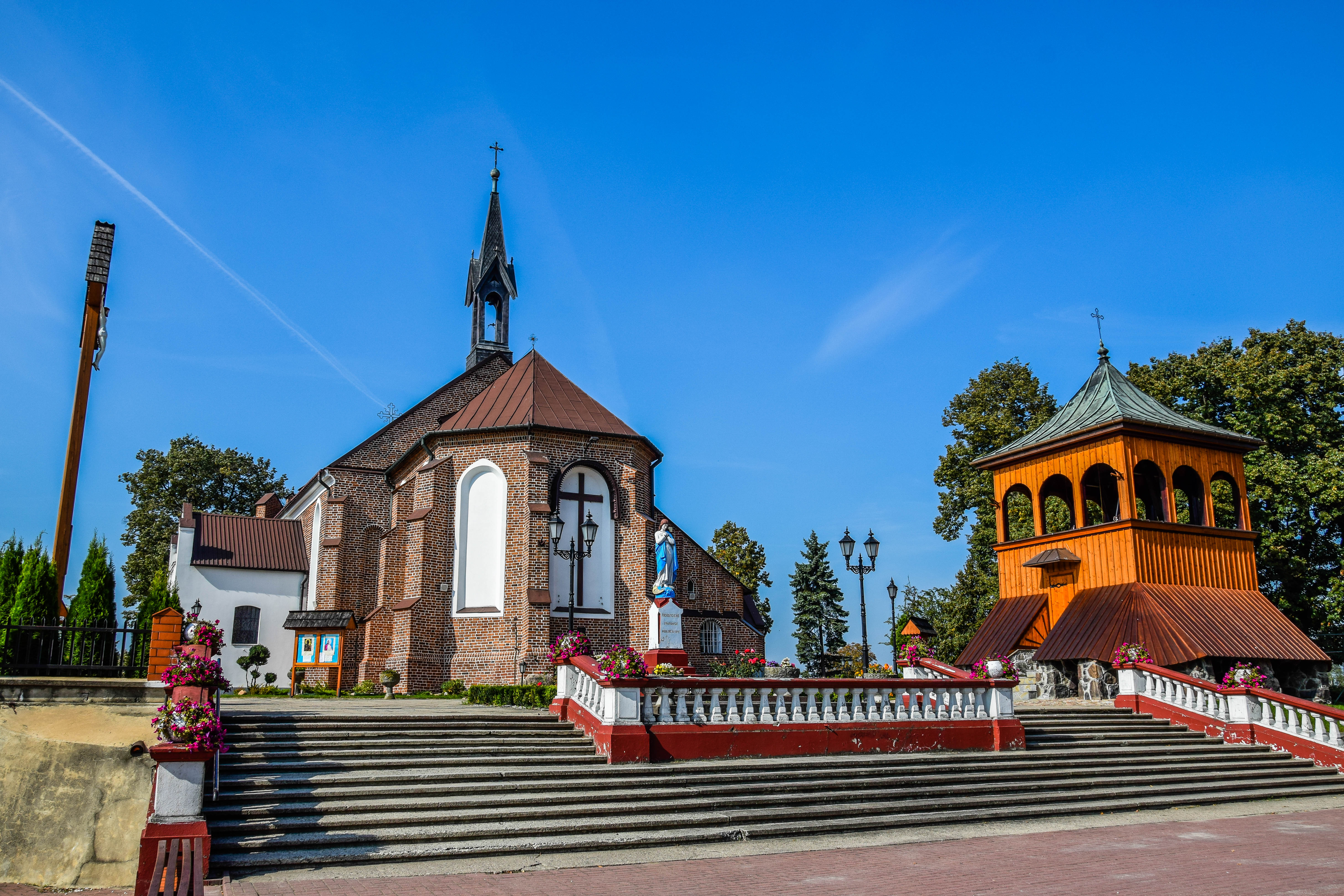 Grójec, kościół par. pw. św. Mikołaja, XVI